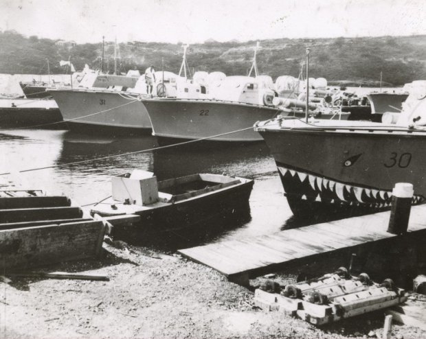 Torpedomotorboten Hr.Ms. TM 22 (1941-1947), Hr.Ms. TM 30 (1941-1946) en Hr.Ms. TM 31 (1941-1944) op de marinebasis Parera, Curaçao